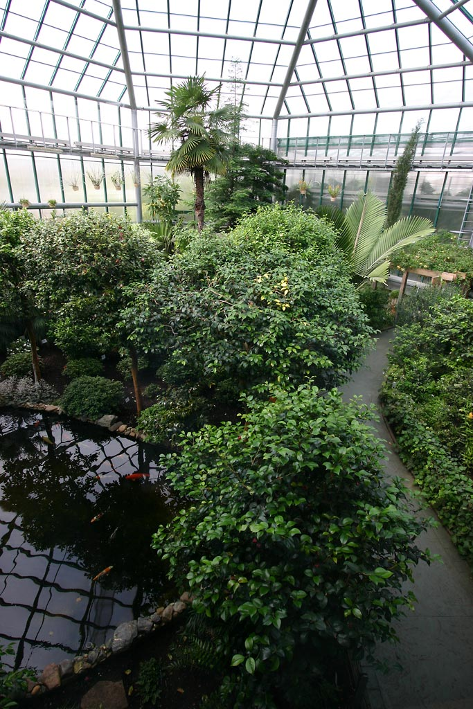 Skleník liberecké botanické zahrady.